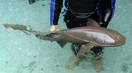 Sitruunahai